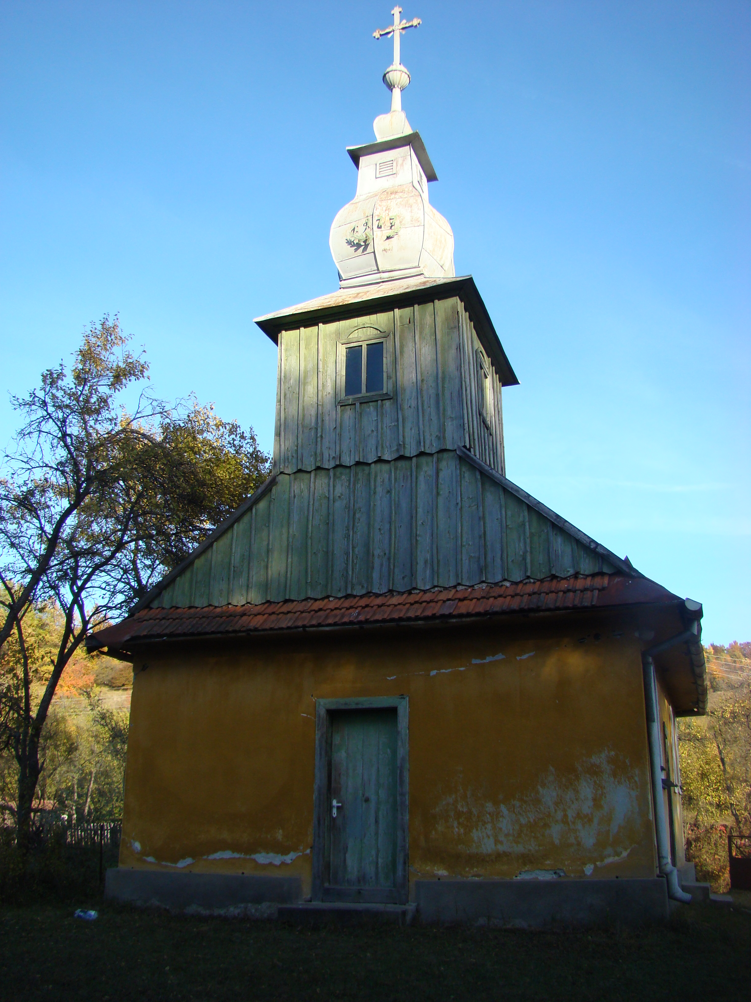 Biserica de lemn "Înălţarea Domnului" din Groși, județul Arad